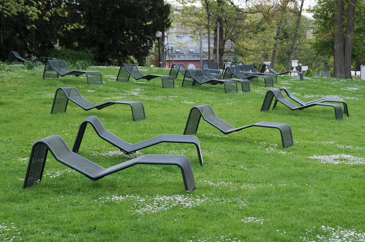 Palmengarten, Frankfurt am Main, Hessen, Deutschland